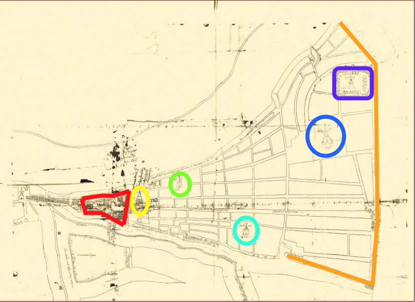 План Тюмени около 1700 года из книги П. М. Головачёва "Тюмень в XVII столетии" (изд. 1903 года). Обнаружен в "портфелях Миллера". С обозначениями. Создан на основе File:План Тюмени около 1700 года (Головачев).jpg, обозначения сделаны в соответствии с Белич И. В. Чертёж г. Тюмени рубежа XVII–XVIII вв. и топография «Царёва городища» (Чимги/Цымги-Туры) // Вестник археологии, антропологии и этнографии ИПОС СО РАН : журнал. — Тюмень, 2009. — № 11. — С. 149. — ISSN 1811-7465. Контурами обозначены: красным - Тюменский кремль, оранжевым - стена острога (ныне ул. Челюскинцев), жёлтым - церковь Всемилостивого Спаса, зелёным - церковь Илии Пророка, голубым - церковь Архангела Михаила, синим - церковь Знамения Пресвятые Богородицы, фиолетовым - Алексеевский девичий монастырь с церковью Успения Пресвятые Богородицы.